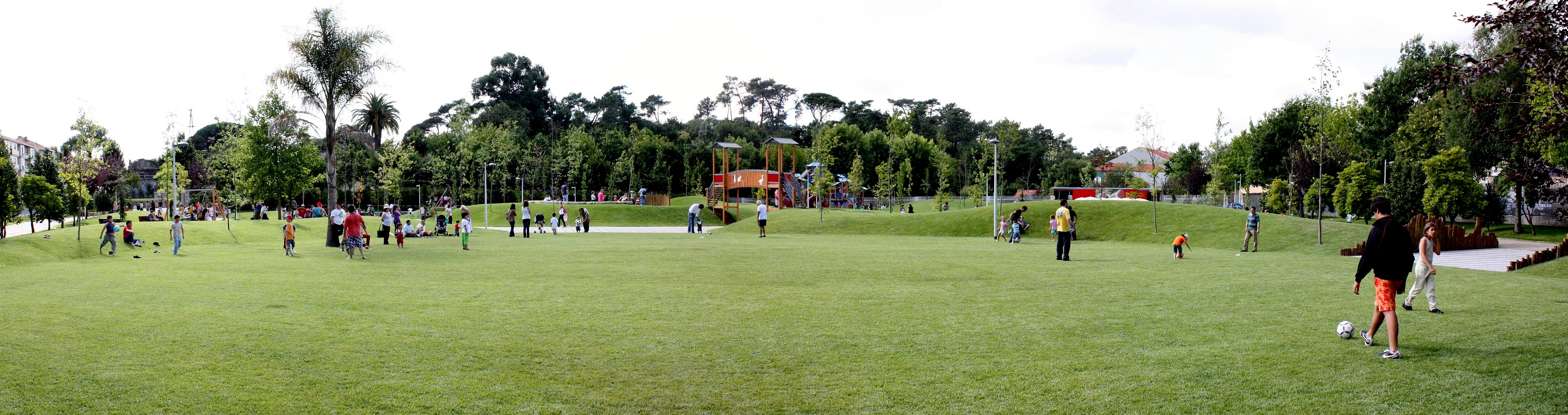 Fiquei bastante contente por descobrir que no meio da cidade nasceu este fantástico espaço ao ar livre para a criançada! Recomendo vivamente.